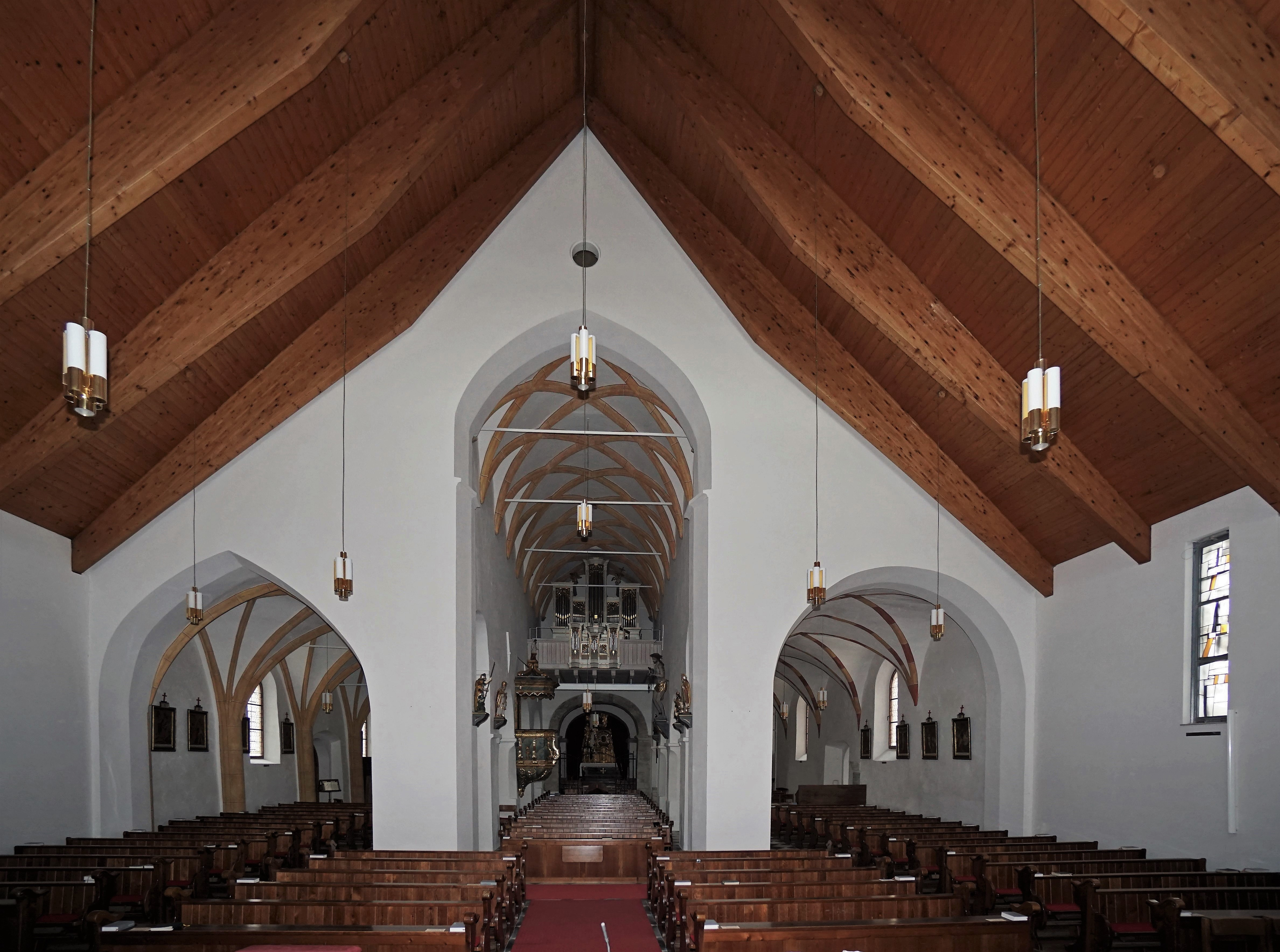 Stadtpfarrkirche Mariae Himmelfahrt (Maria Dorn), Innenansicht nach Osten